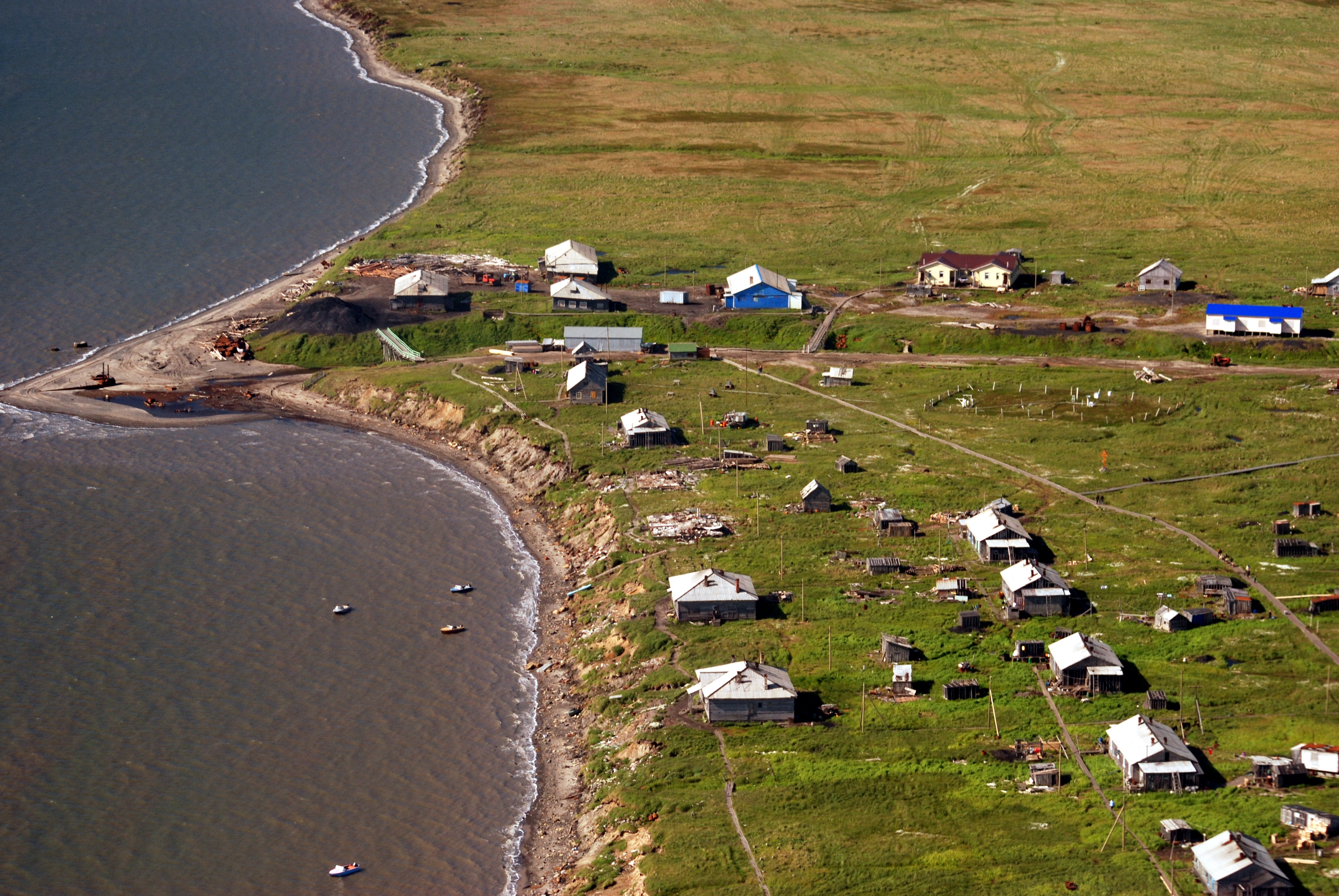 Kolguev Bugrino